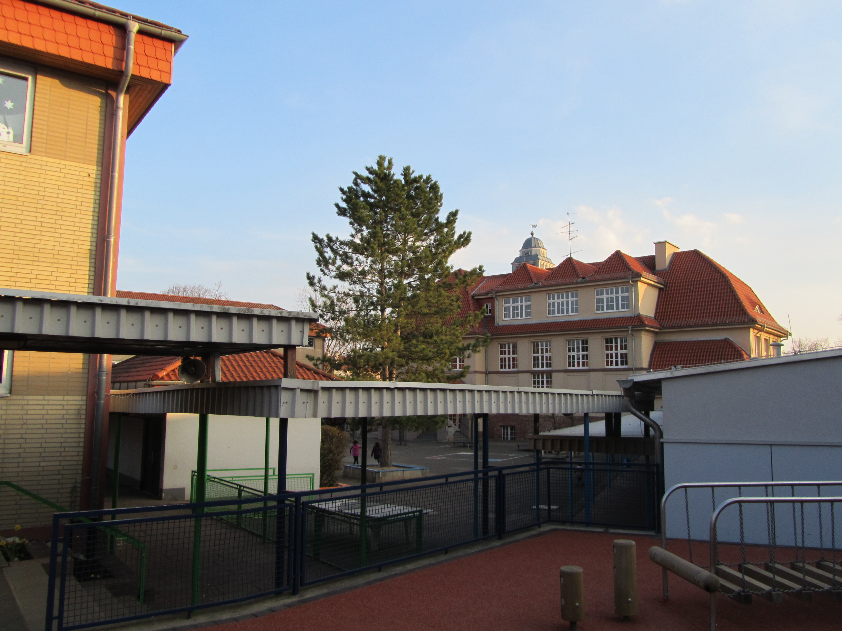 Bad Soden Taunus Theodor heuss schule